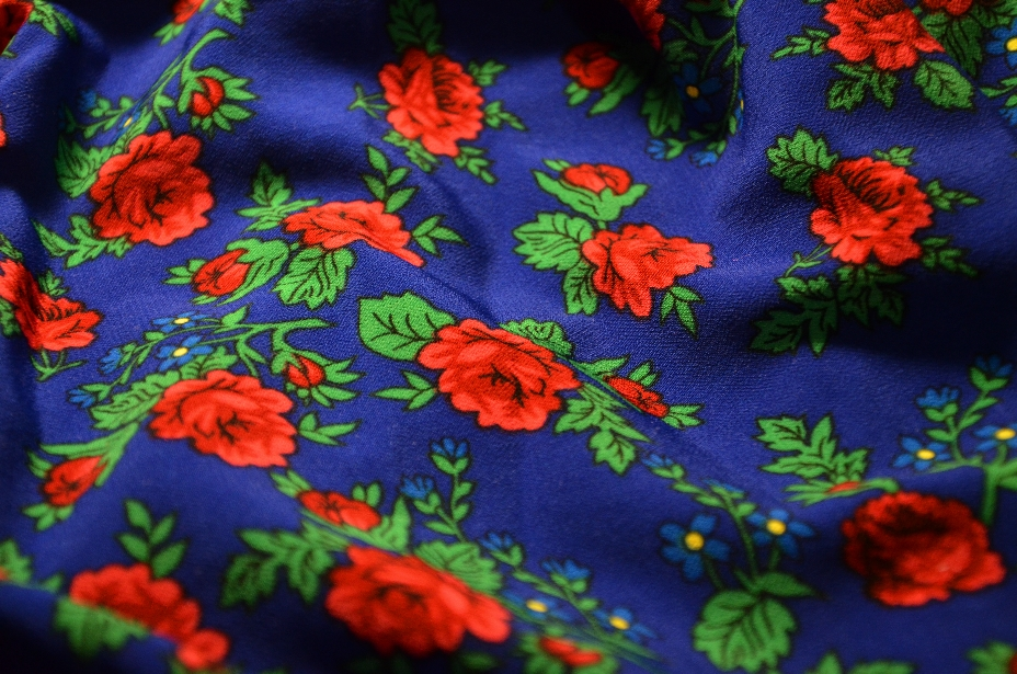 Wzór na tkaninie z wełny tybetowej, typowy dla górali podhalańskich.